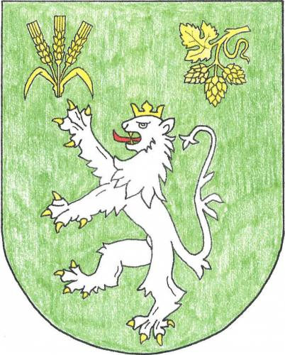 Smilovice, okres Rakovník, znak